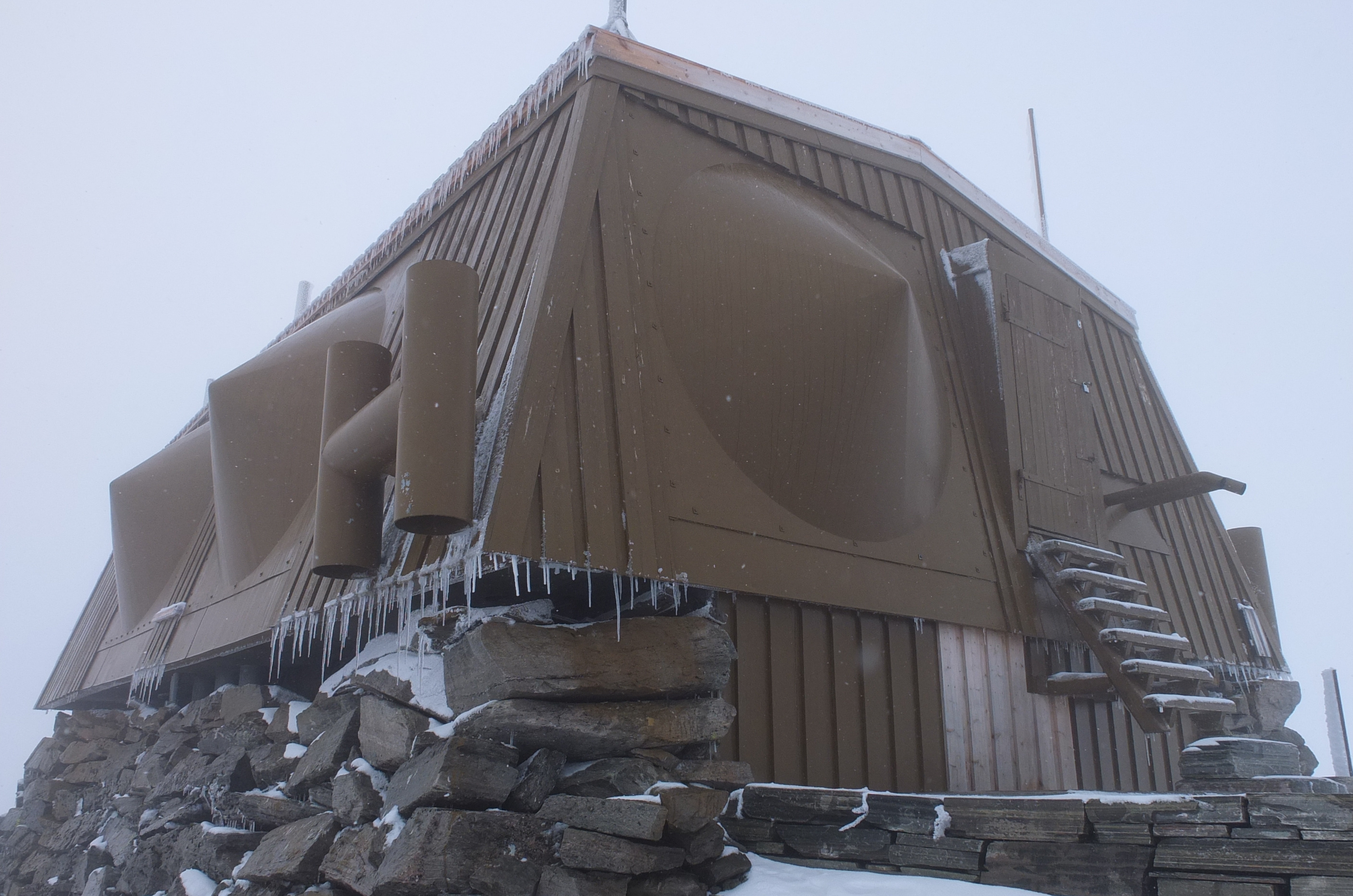 Forsvarets sambandsstasjon på Stortoppen, Snøhetta